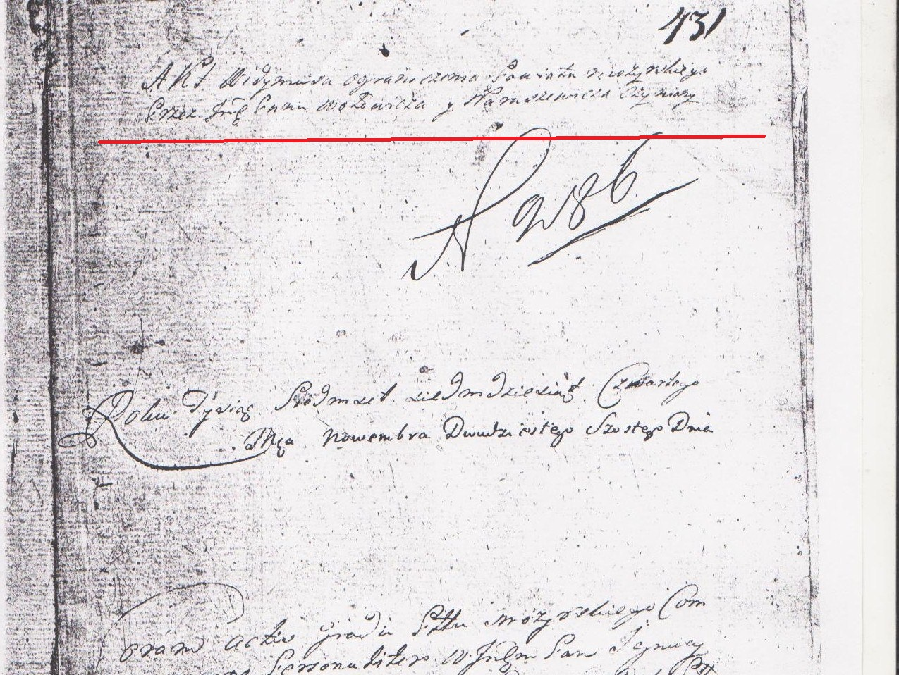 Акт разграничение королевских сёл Мозырского повета